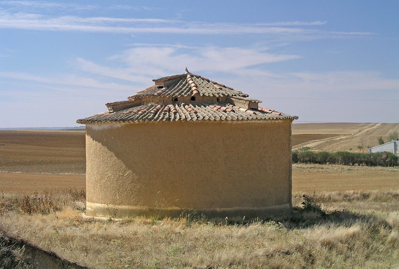 Palomar en Palazuelo de Vedija (Tierra de Campos, Valladolid). Planta circular, segundo nivel cuadrado.